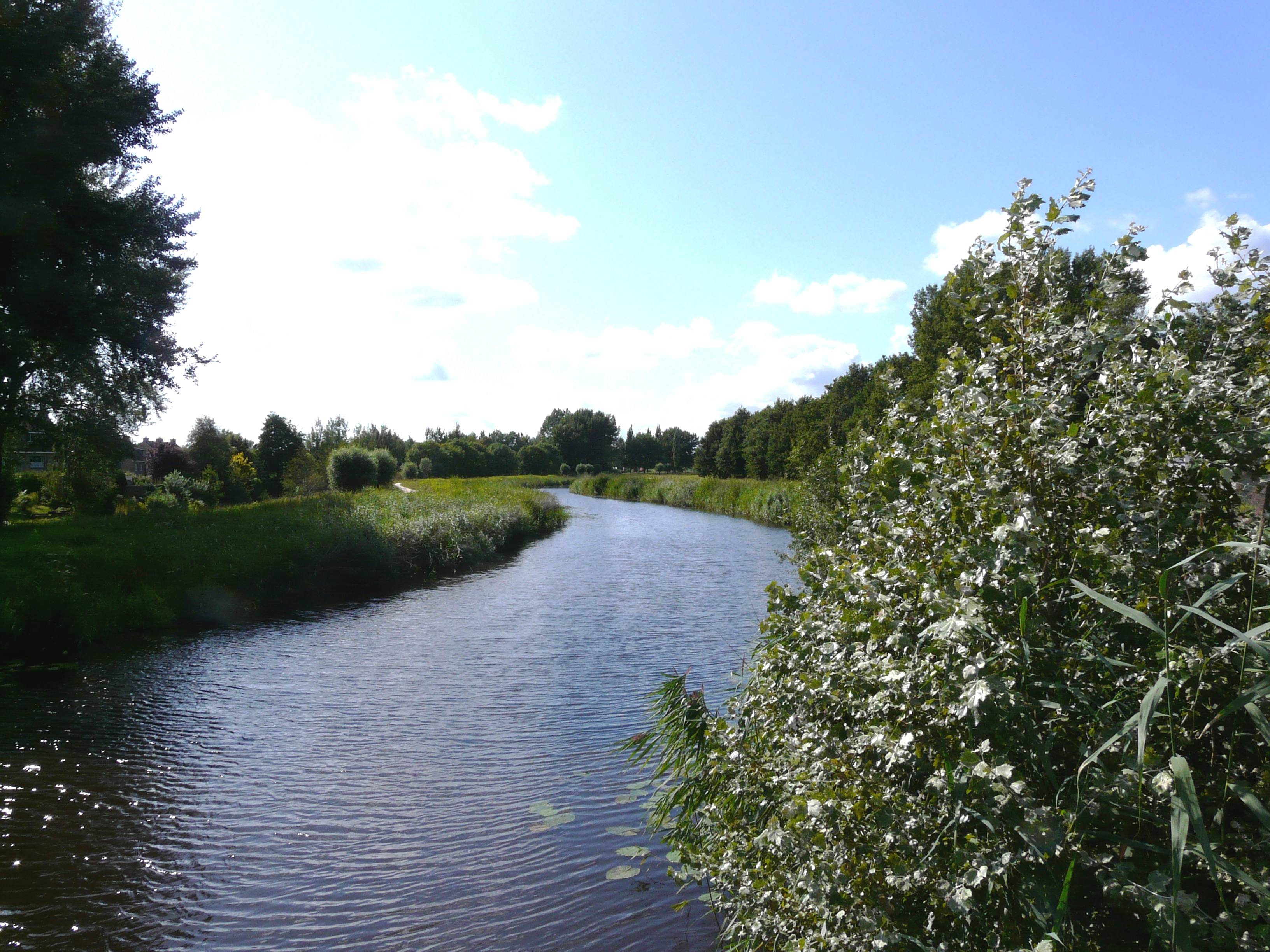 Alde Drait tusken de Trisken en de Drait yn Drachten